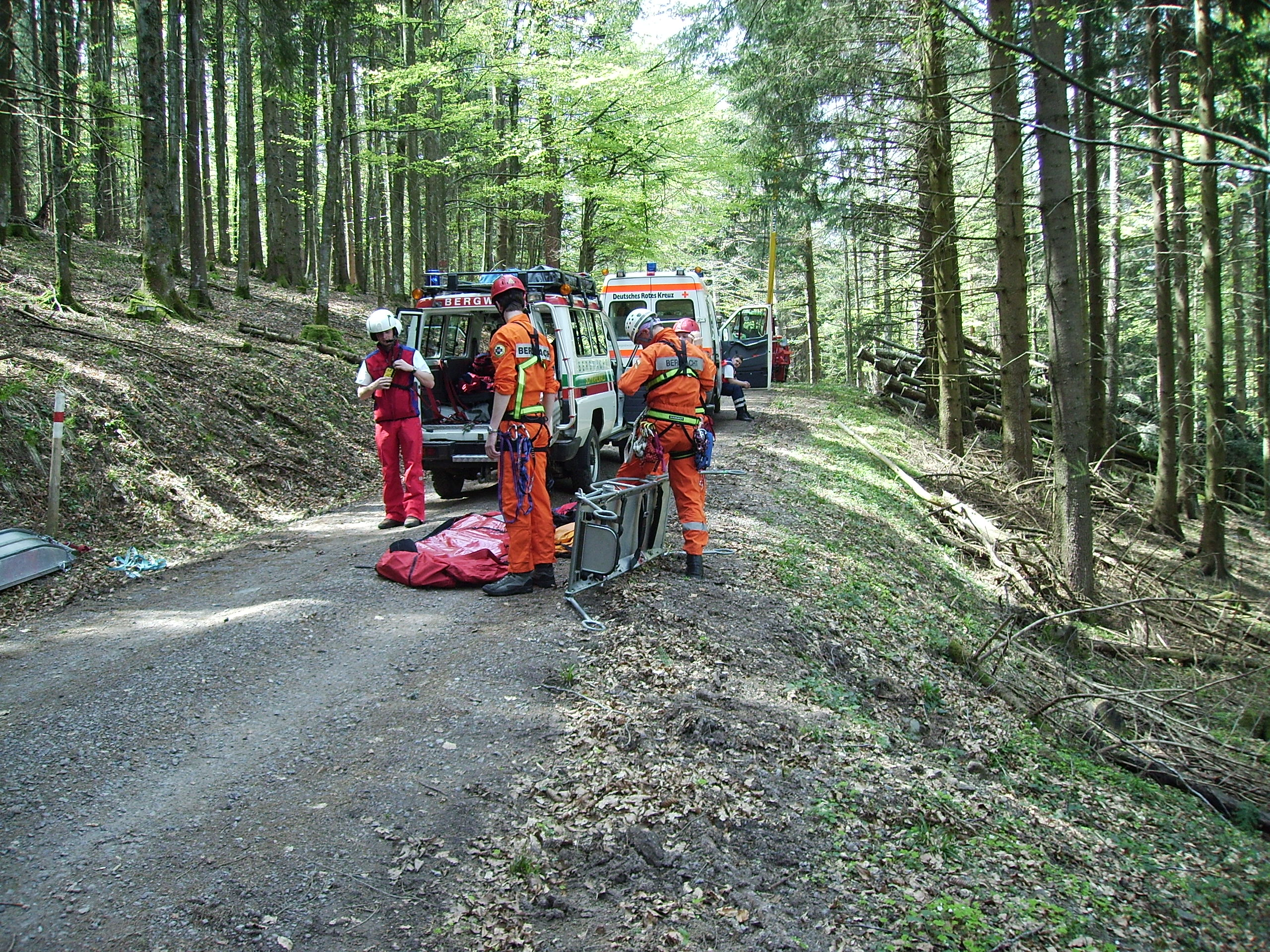 Einsatz der Bergwacht Freiburg (Waldarbeiterunfall), im Hintergrund Einsatzfahrzeuge der Bergwacht und des Straßenrettungsdienstes (RTW Kirchzarten) Mountain Rescue Freiburg (Germany) rescuing a lumberjack met with an accident, in the background vehicles of German Black Forest Mountain Rescue and Red Cross (Kirchzarten)